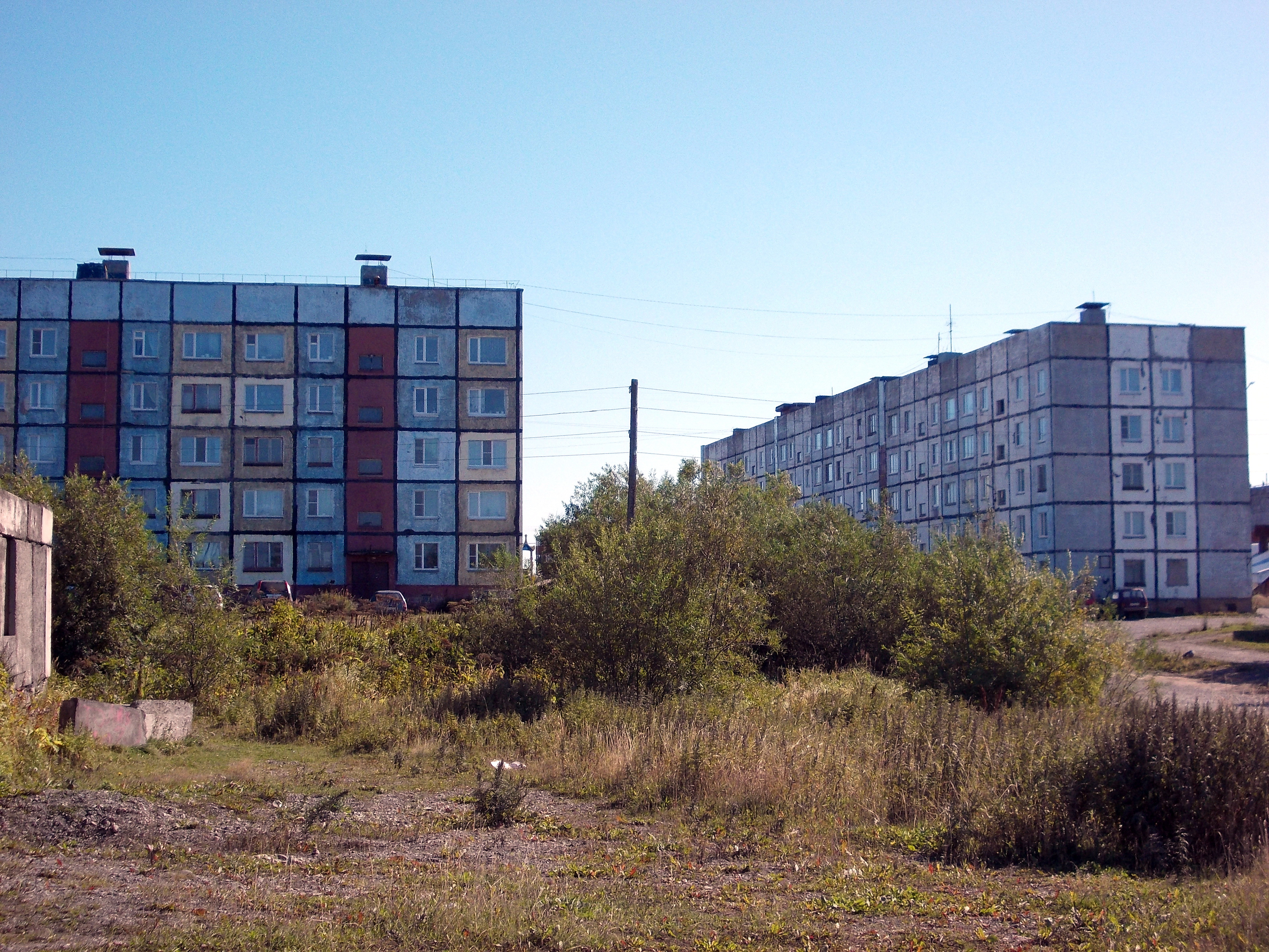 Ust'-Bolszerieck przy wjeżdzie od strony Pietropawłowska Kamczackiego